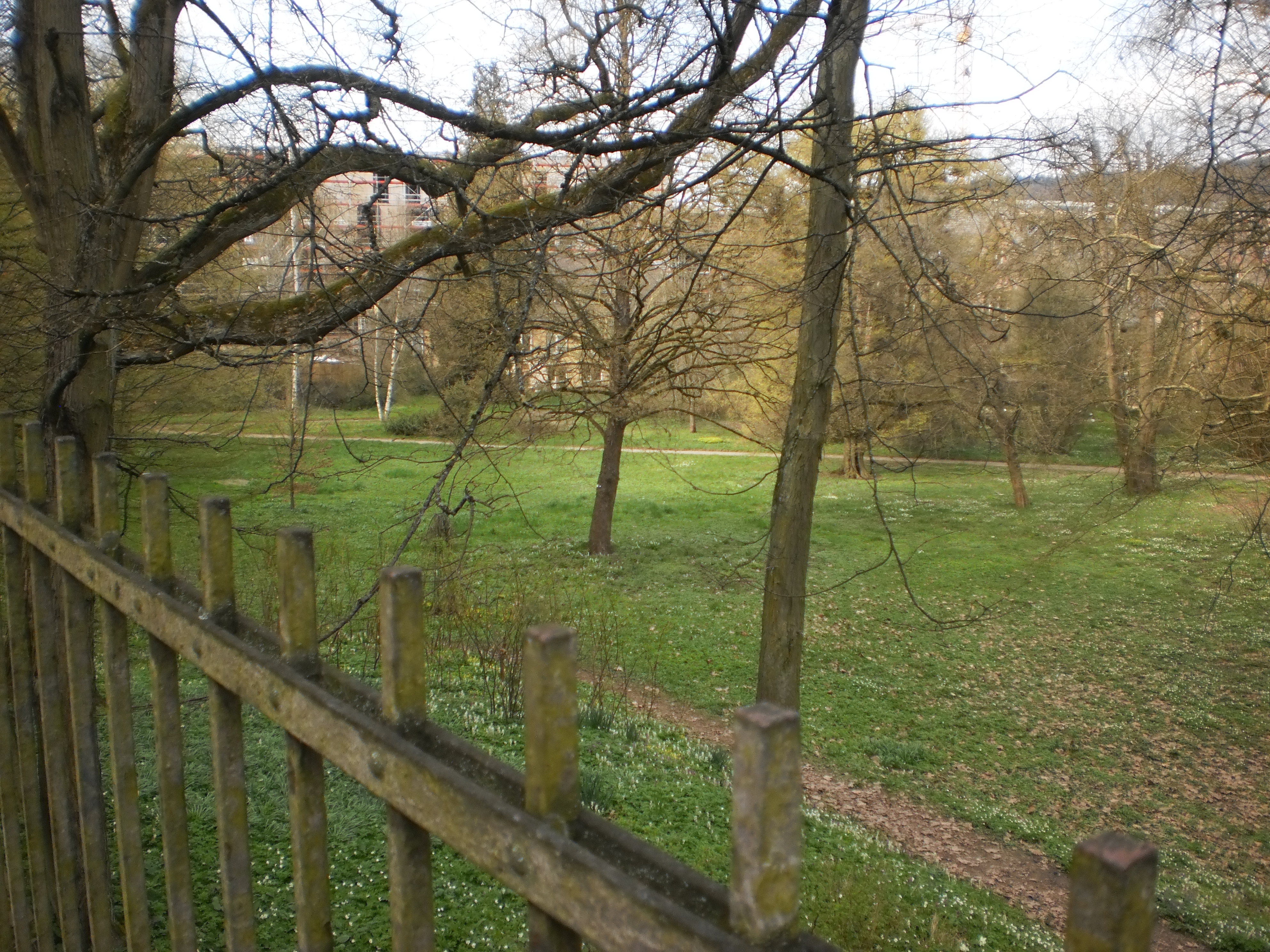 Der Alte Botanische Garten mit dem Neubau der Zentralen Universitätsbibliothek (ZUB) Marburg der Philipps-Universität im April 2016. Foto von der etwas erhöht unterhalb der Oberstadt vorbeiführenden Strasse Pilgrimstein, nicht weit des Neubaus des Deutschen Sprachatlas (etwa 100 m rechts des Bildes).